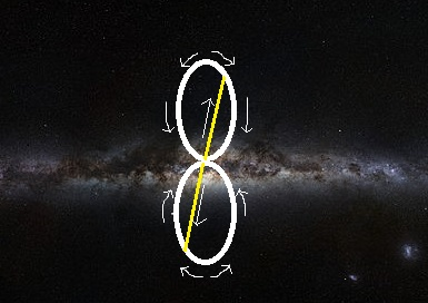 En jaune, les jets de particules. Les flèches blanches indiquent le sens du déplacement du gaz dans les Bulles de Fermi. Image de la Voie Lactée de ESO/S. Brunier.